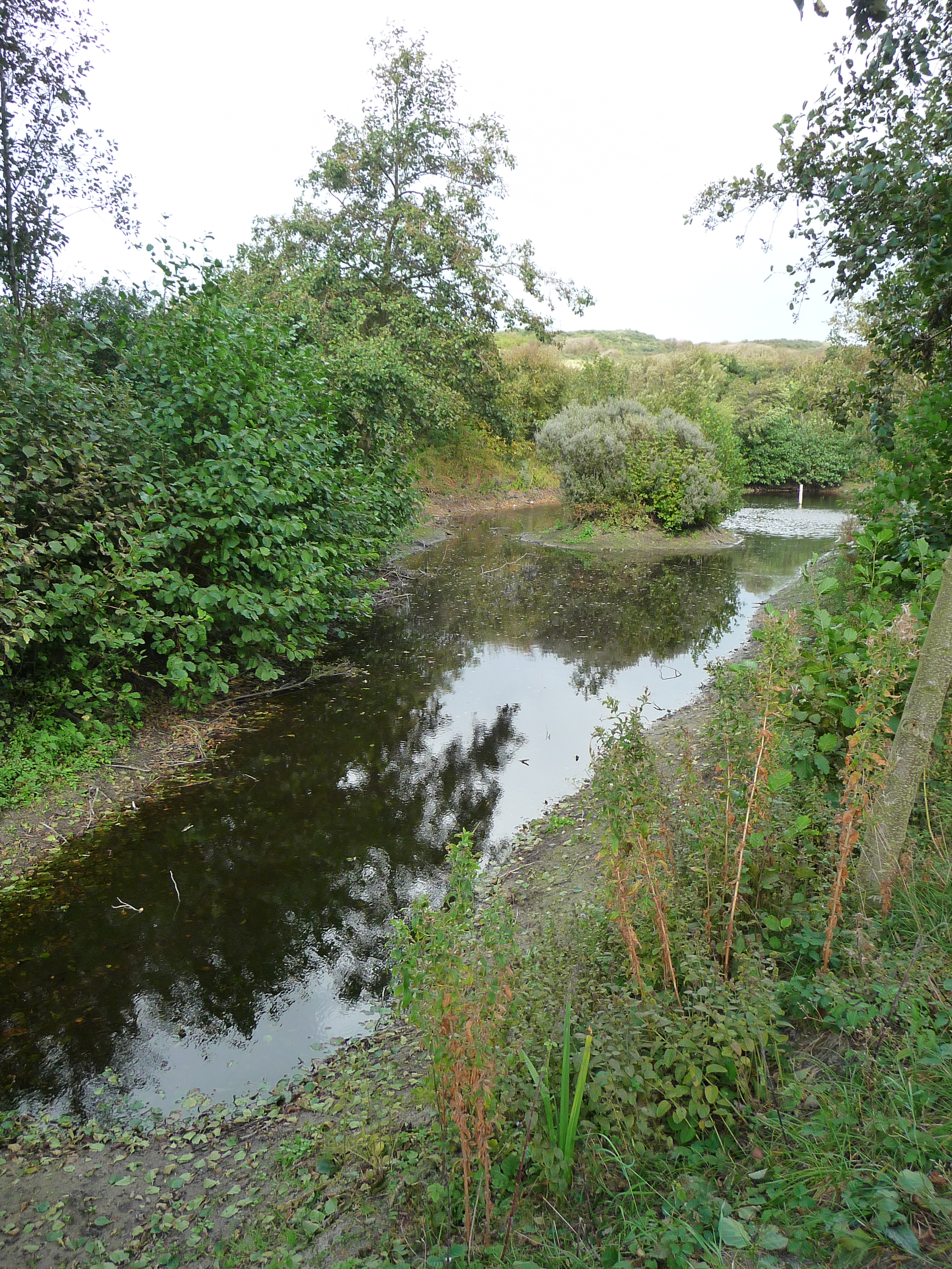 Goldfischteich auf der ostfriesischen Nordseeinsel Juist (Niedersachsen, Deutschland), angelegt von Otto Leege